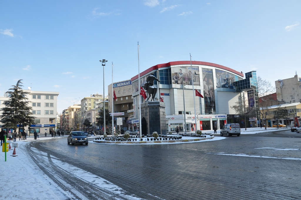 niğde